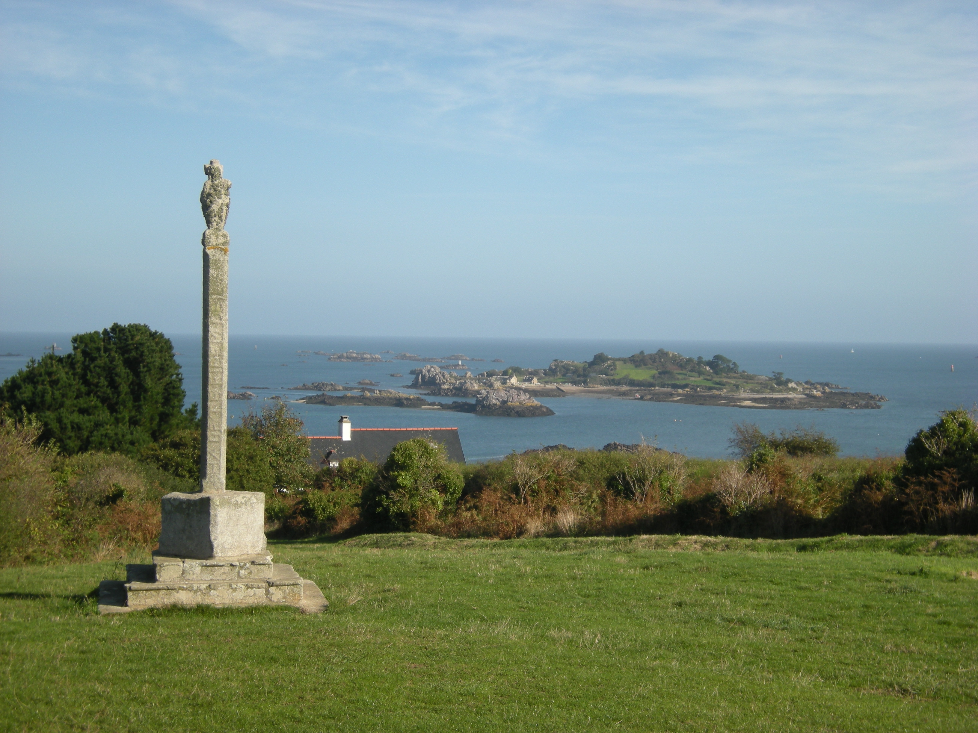 Vues de Ploubazlanec depuis Pors-Even et depuis la Croix des veuves : Pors-Even, île Saint-Riom et baie de Launay La croix des veuves, pointe de la Trinité. Vue de l'île Saint-Riom au second plan